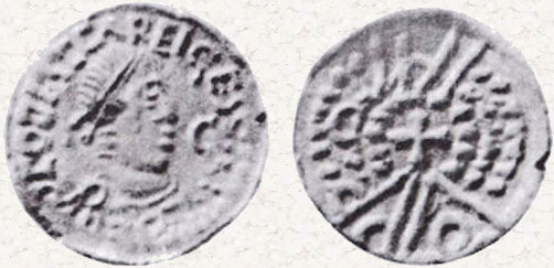 Tremís atribuido a Audeca. Colección perdida del Museo Arqueológico Nacional (Madrid)